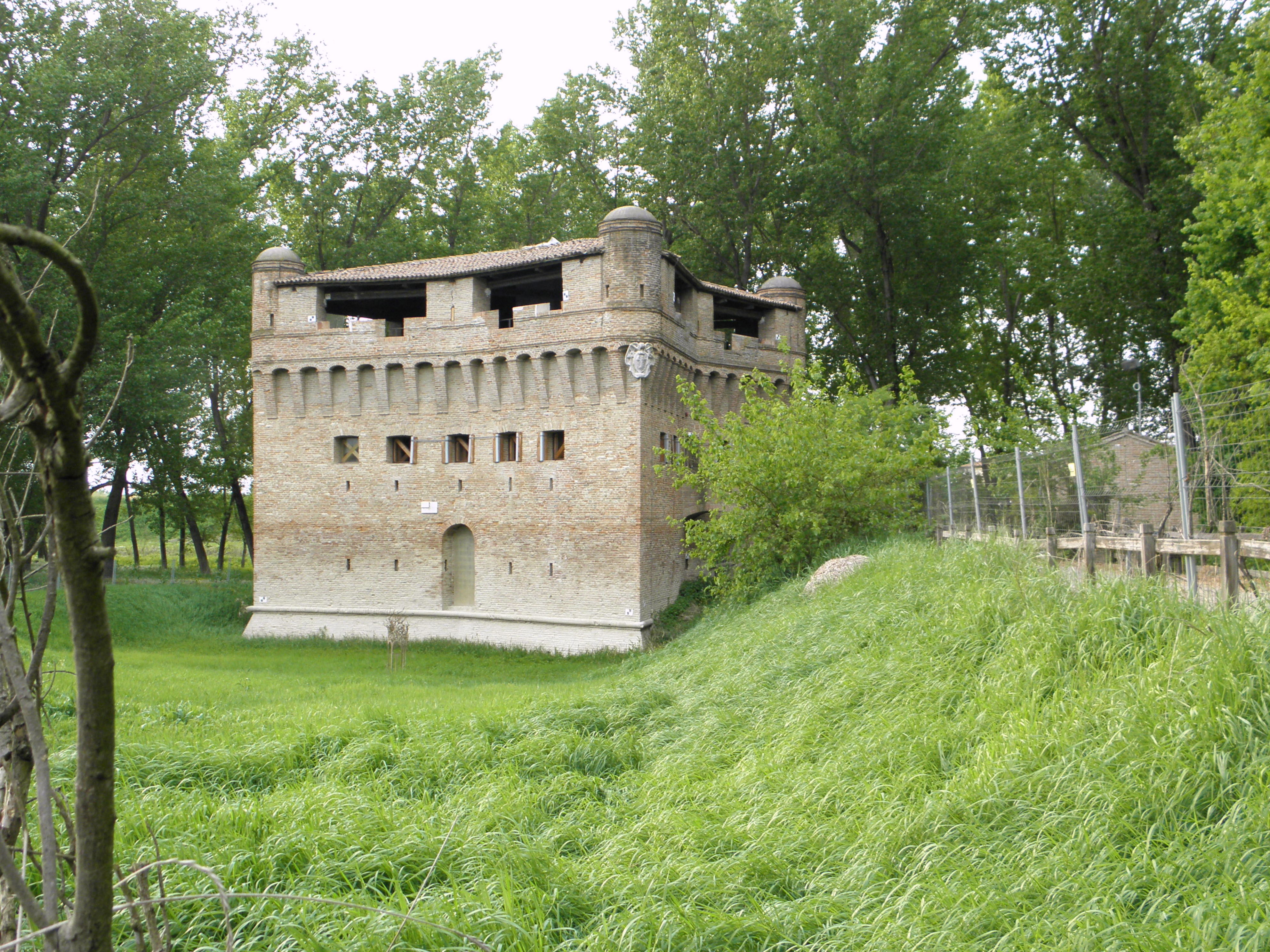 Stellata, frazione di Bondeno: Rocca Possente.